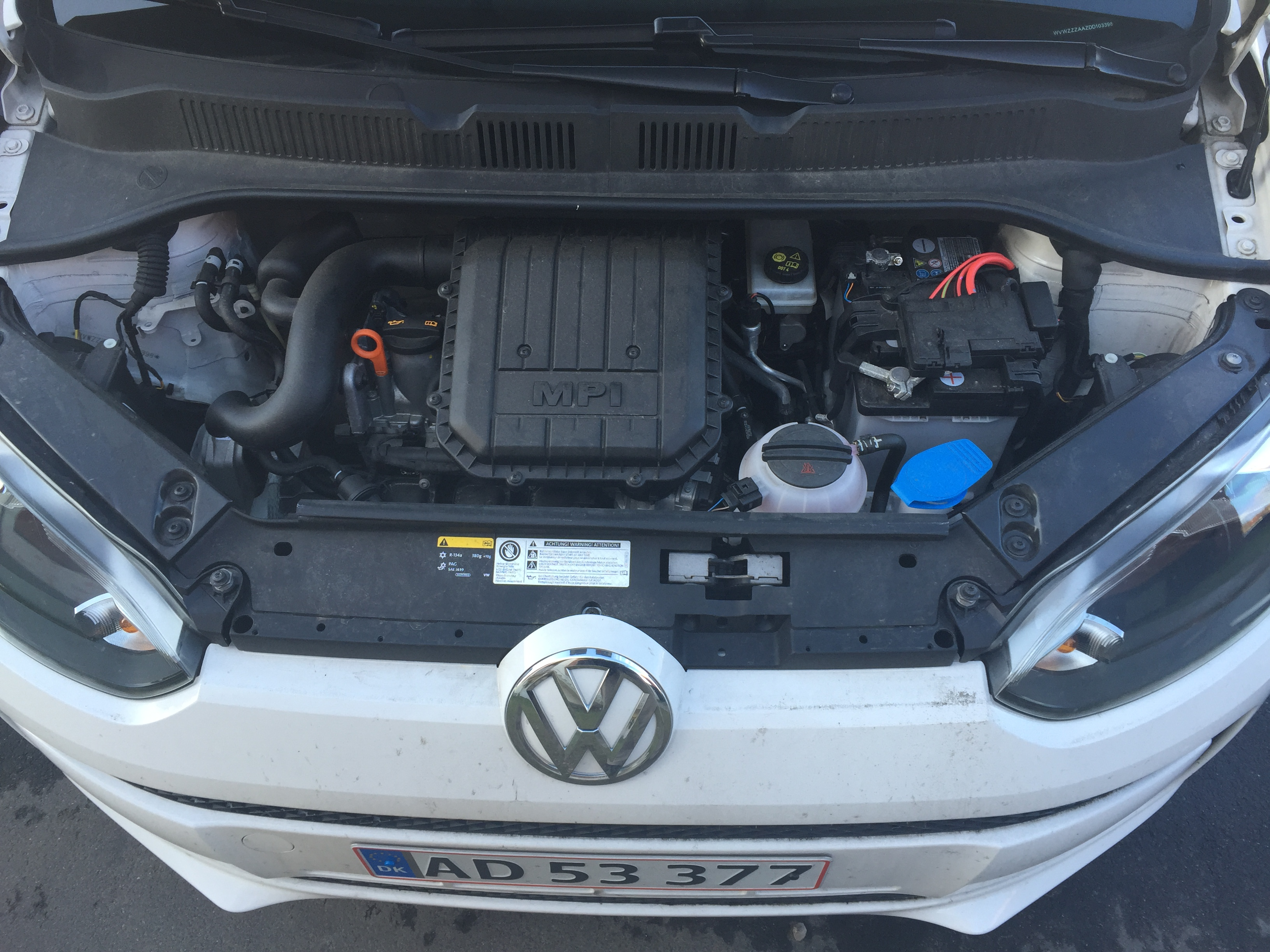 Engine of Volkswagen up!